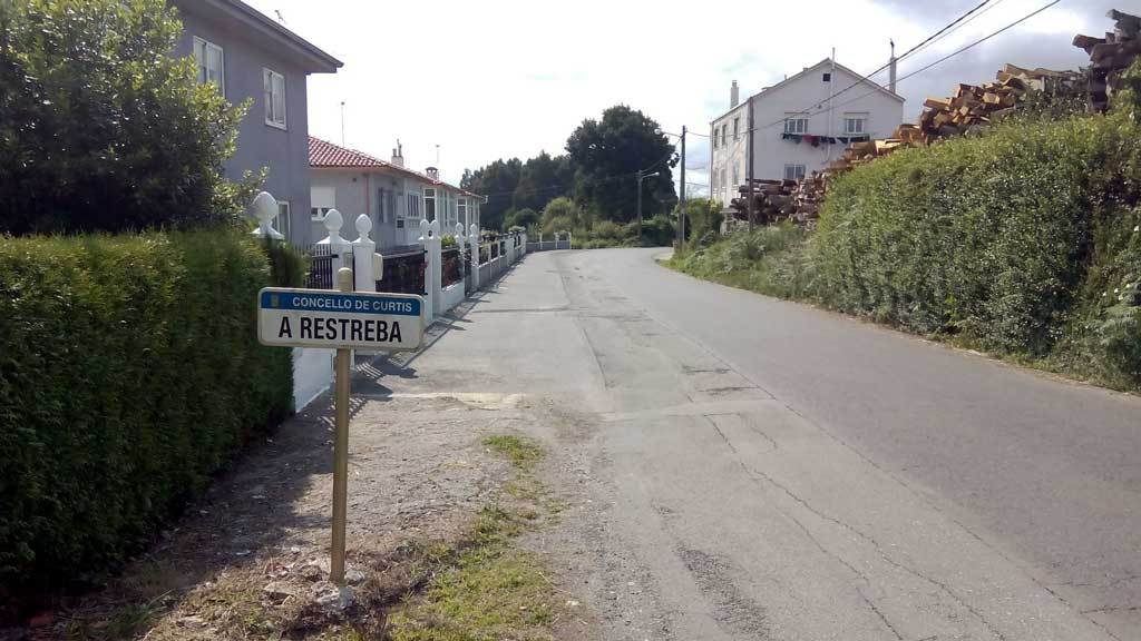 Vista da Restreba, Curtis.